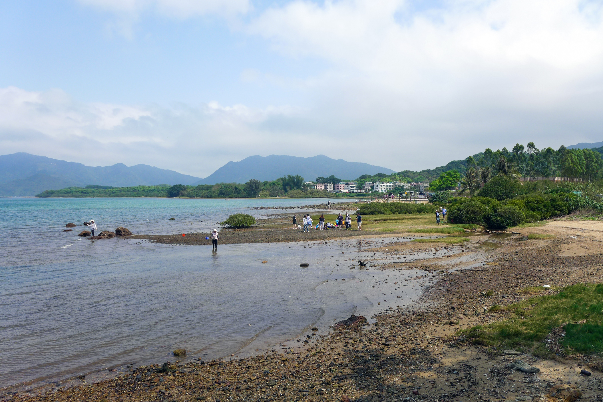 Nai Chung